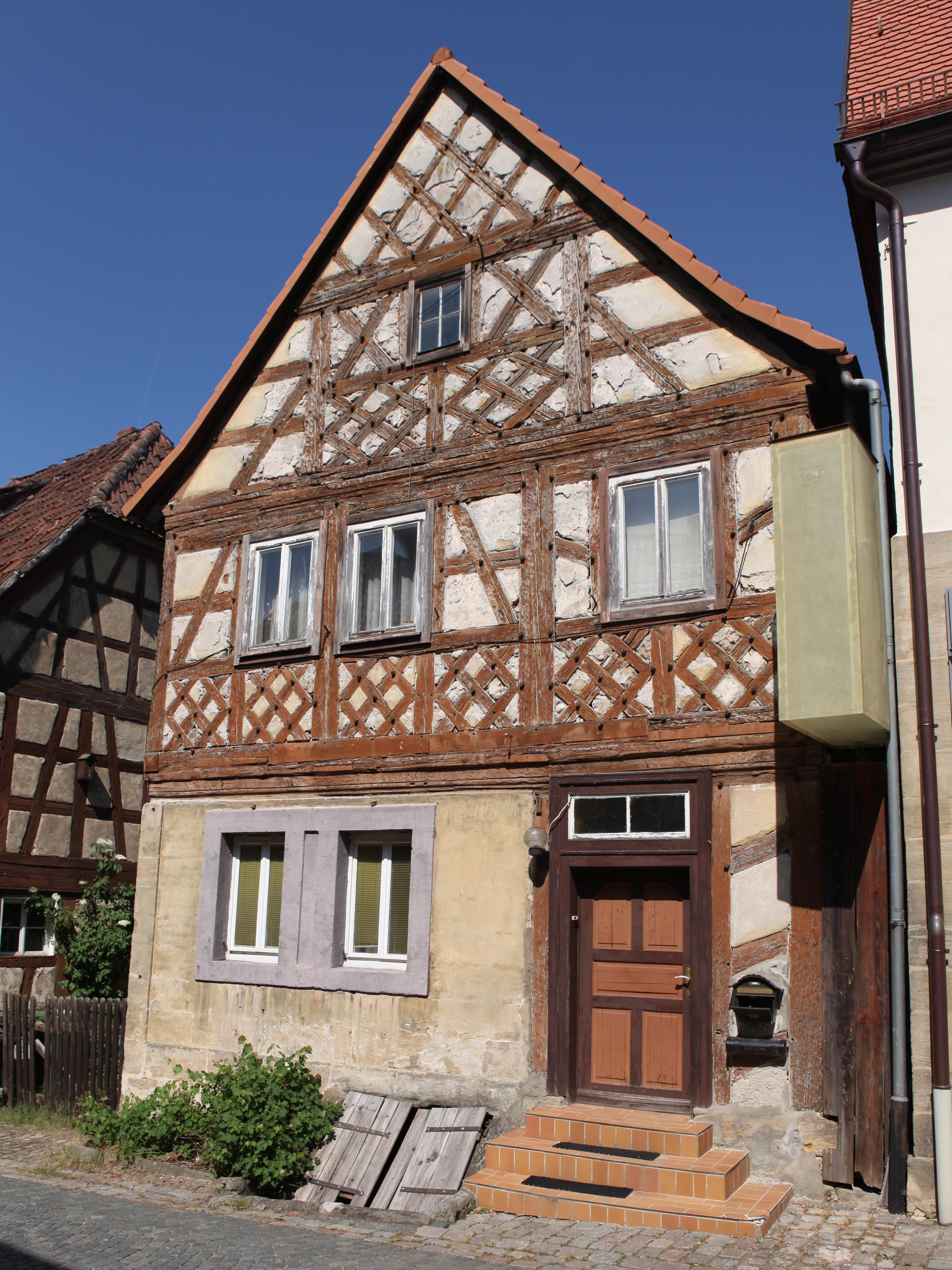 Seßlach-Pfarrgasse112